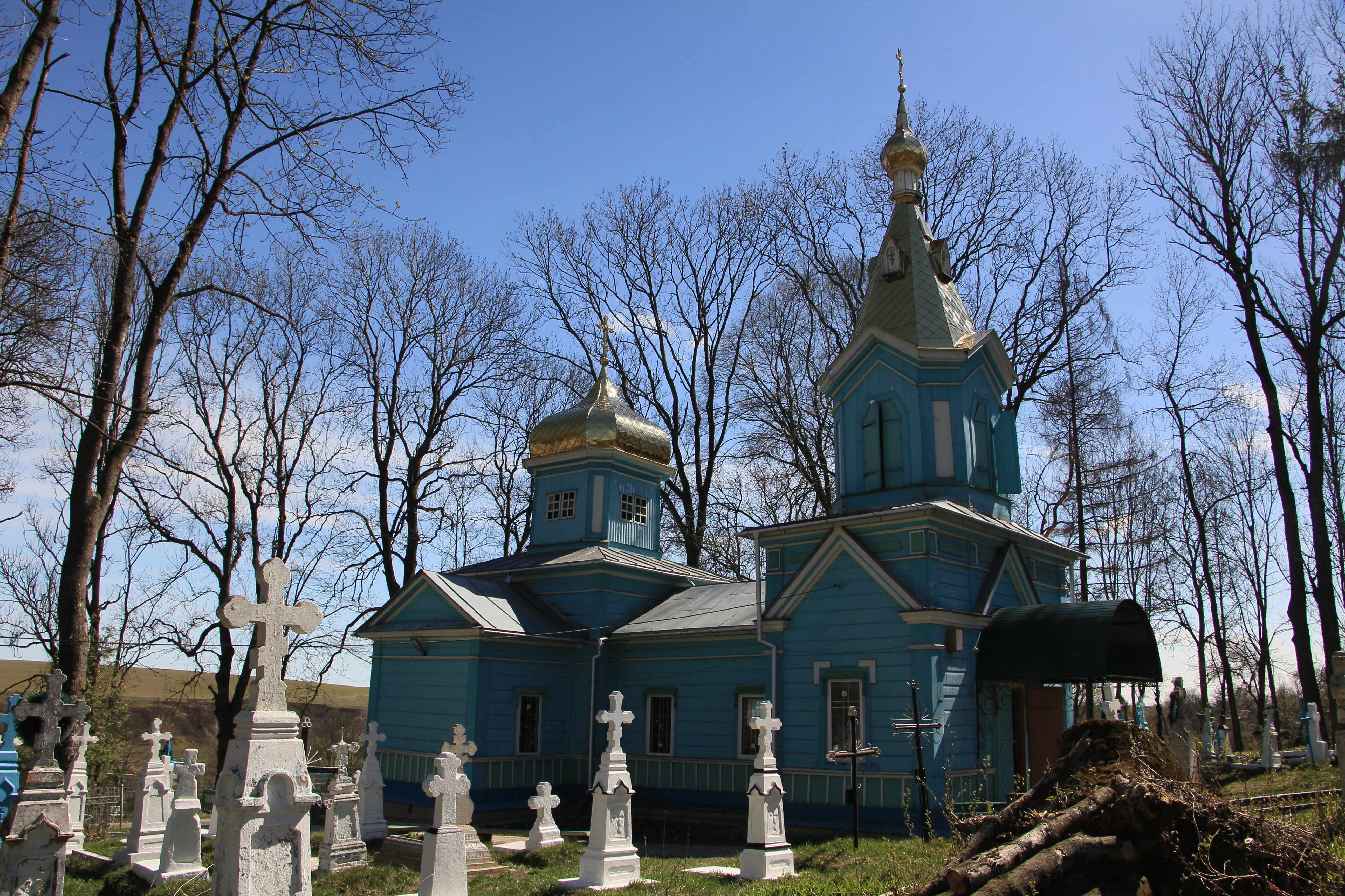 Дерев'яна церква в селі Чеснівський Раківець Збаразького району Тернопільської області